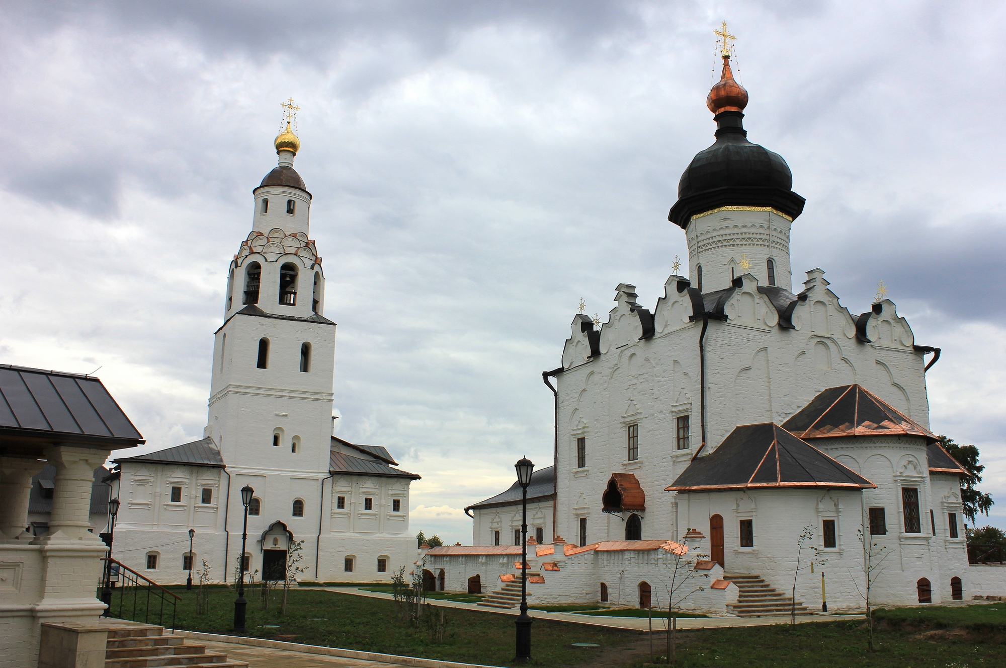 Свияжский историко-архитектурный комплекс, Верхнеуслонский район, Татарстан This image is related to the protected area of Russia number 1610064